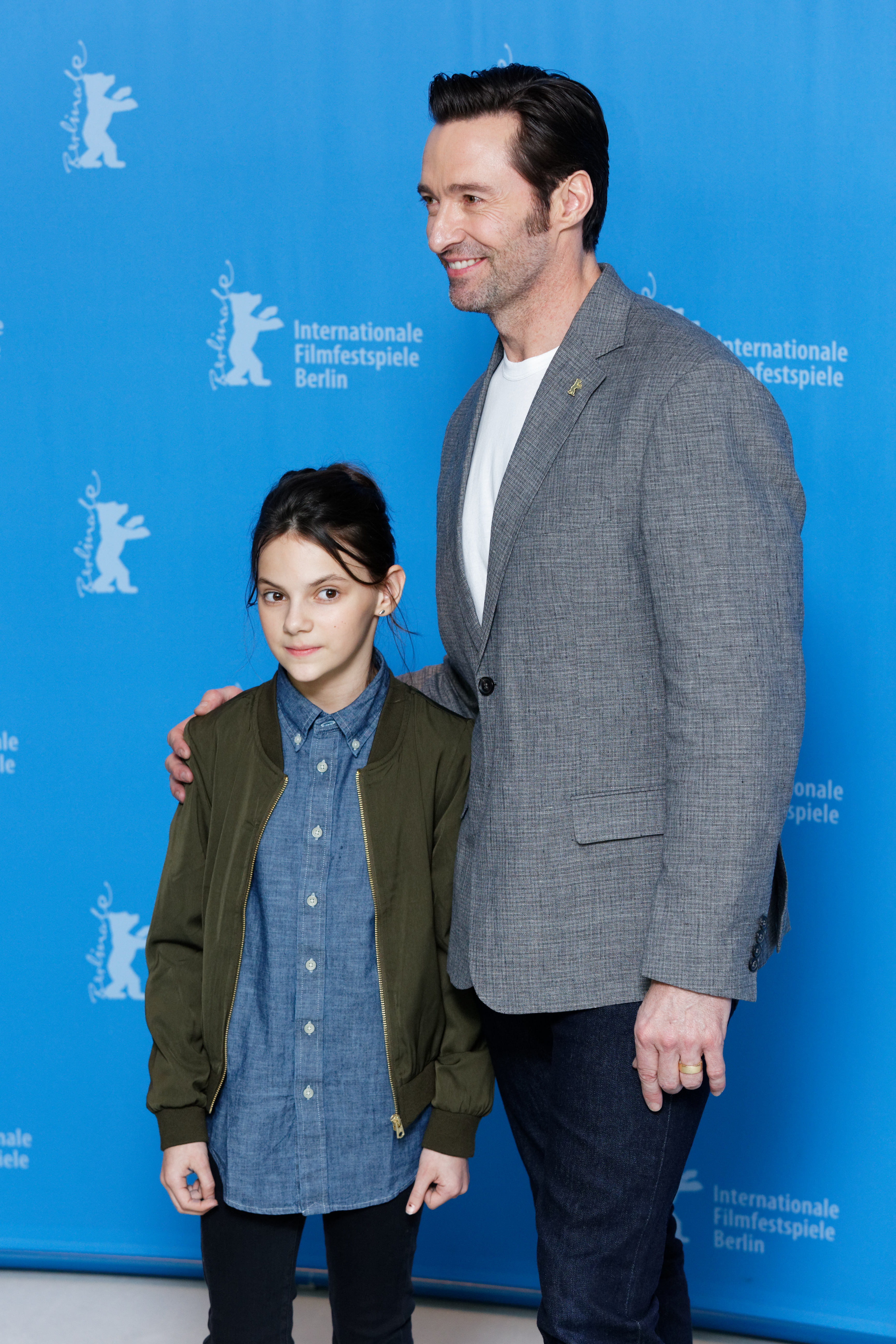 Hugh Jackman mit Dafne Keen beim Photo Call zu Logan bei der Berlinale 2017